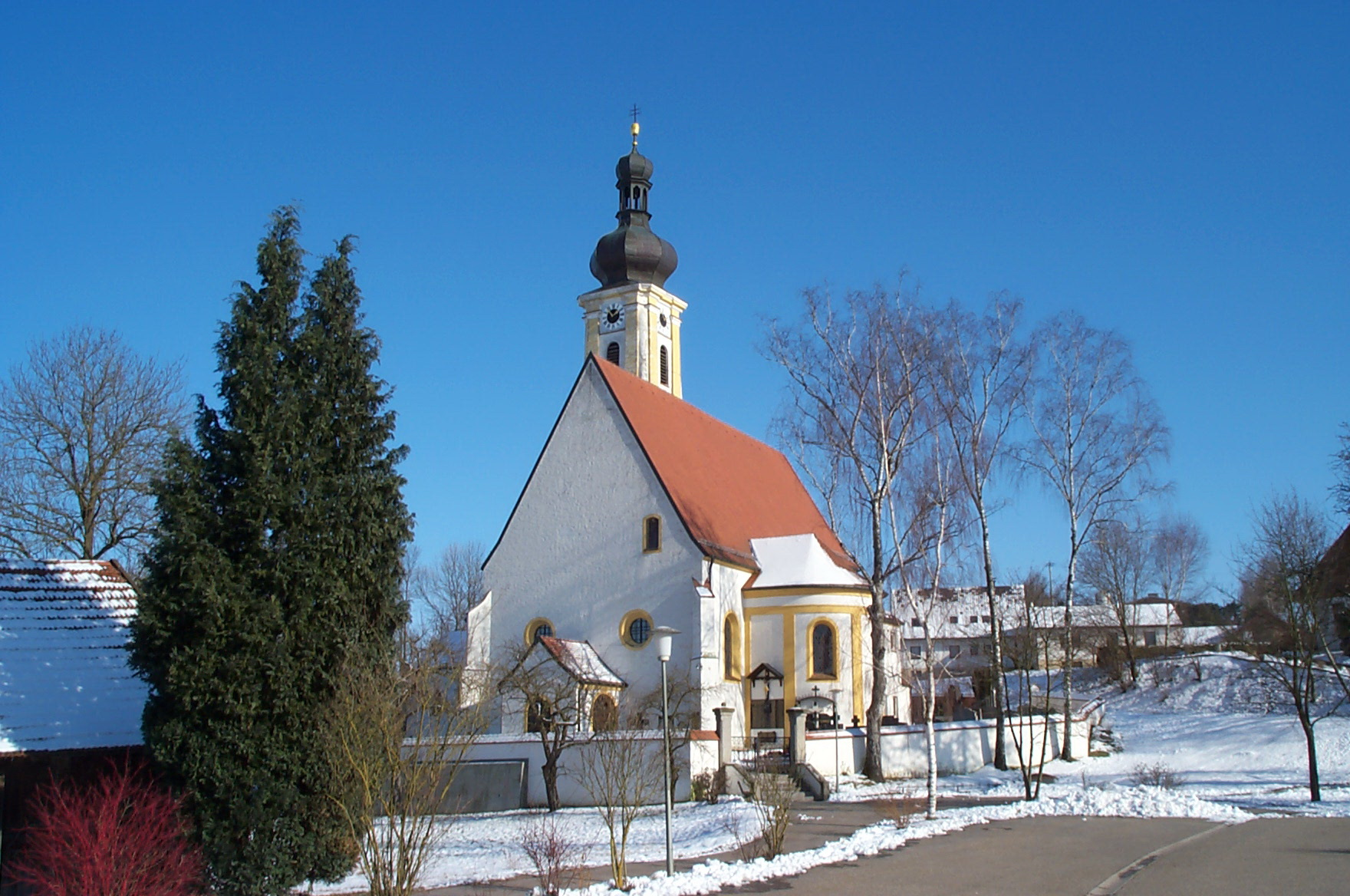 Geiselhöring, Hadersbach 28. Katholische Filialkirche Mariä Himmelfahrt. Erbaut 1521, barockisiert 1716/17; mit Ausstattung; Turmerhöhung 1738/40, Seitenkapellen 1765 Seelenkapelle, 1856/57; mit Ausstattung.